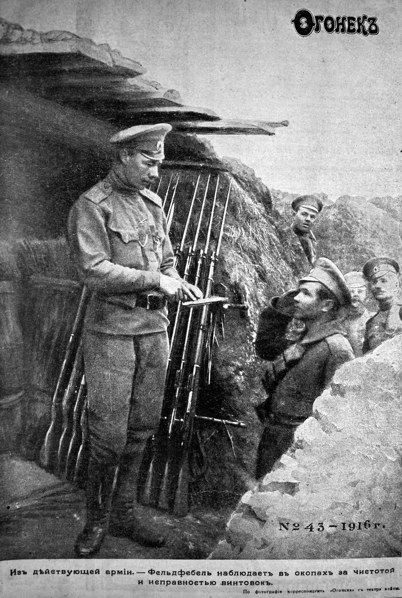 43-й номер журнала «Огонек» за 1916 год со снимком Зализняка на обложке «Фельдфебель наблюдает в окопах за чистотой и исправностью винтовок»